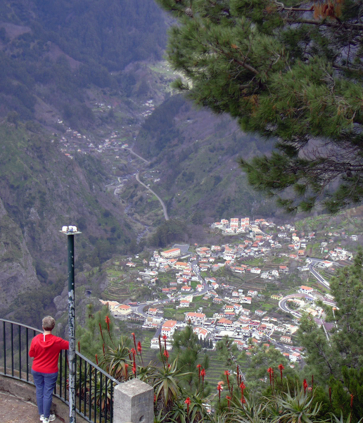 Blick vom Pico do Serrado auf das Nonnental. Curral das Freiras.